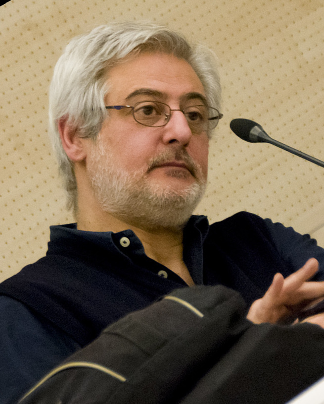 Incontro privato con Bruno Arpaia in occasione del DedicaFestival 2015